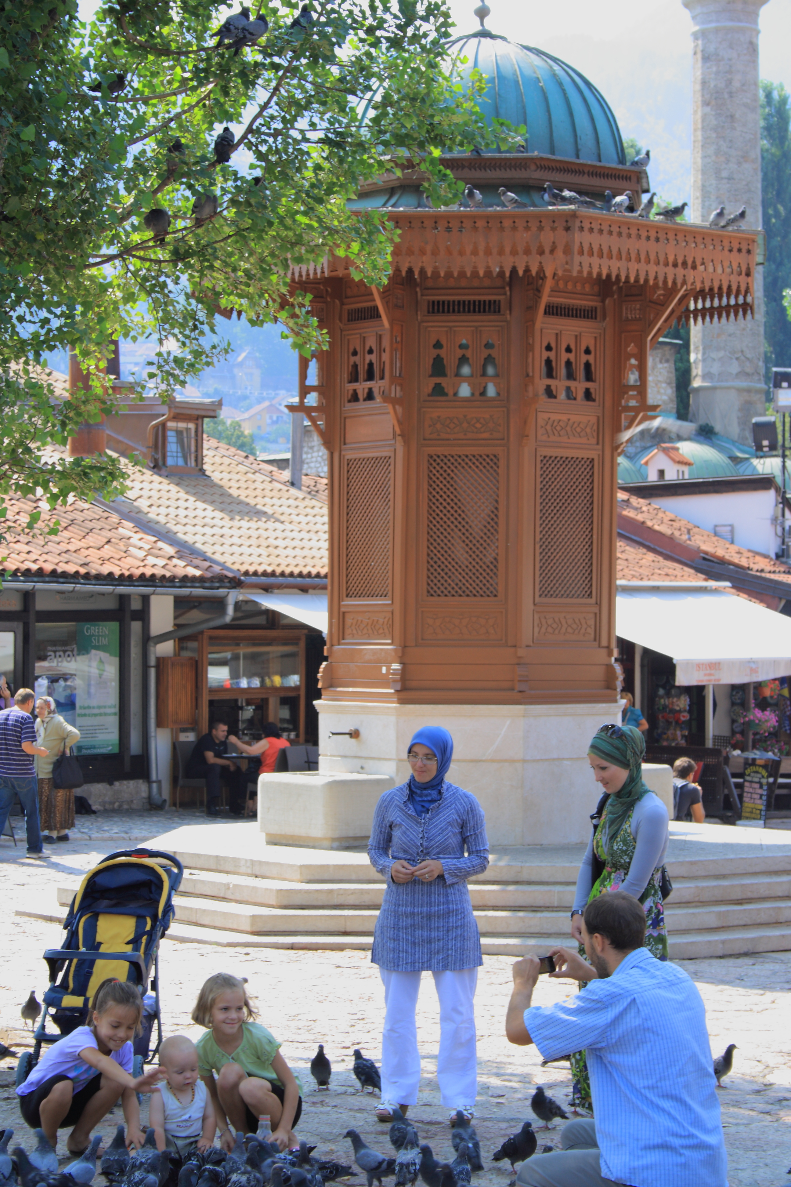 Sarajevo